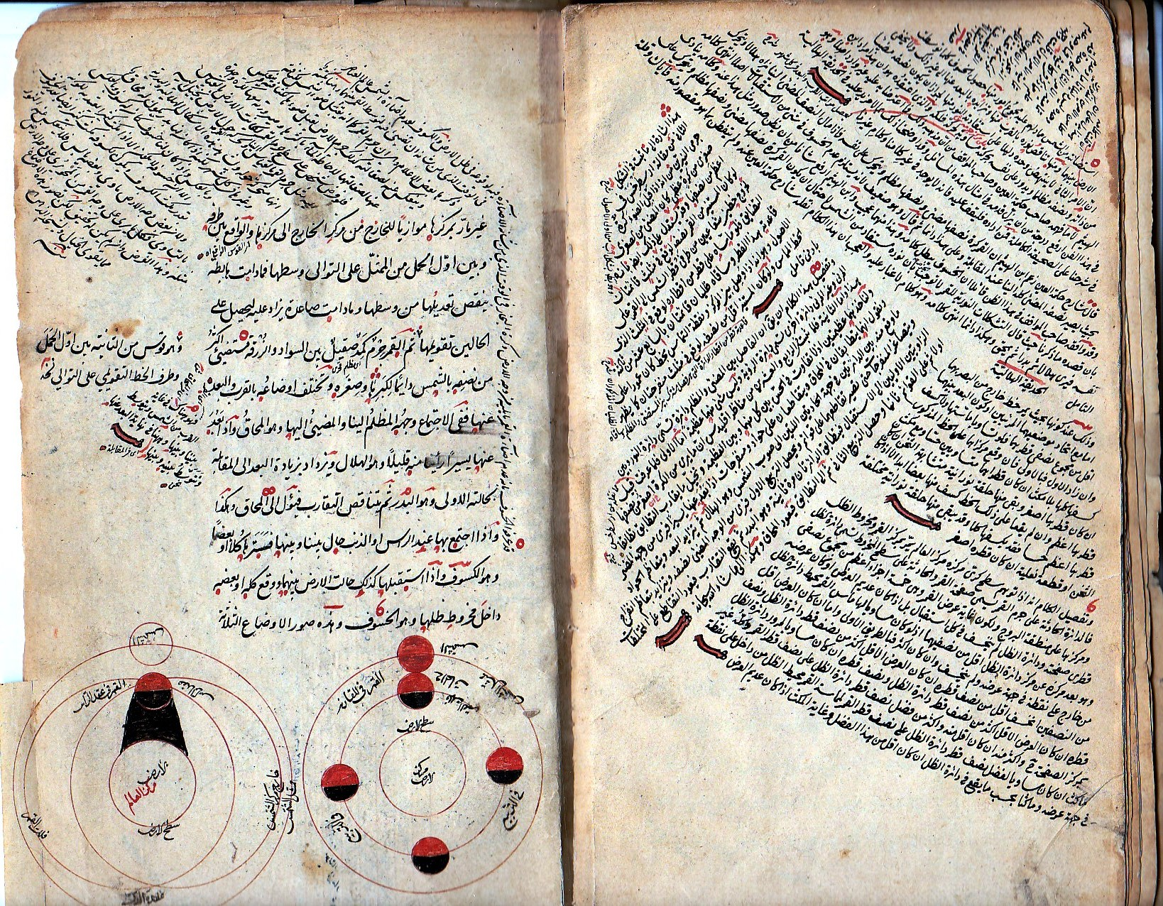 صفحة من كتاب (تشريح الأفلاك) في علم الهيئة، من تأليف بهاء الدين العاملي وعلى غلاف الكتاب ختم واهداء الشيخ نعمان خير الدين الآلوسي إلى استاذهِ وشيخه ملا قاسم أفندي المفتي عام 1273هجري/ 1856م، في بغداد